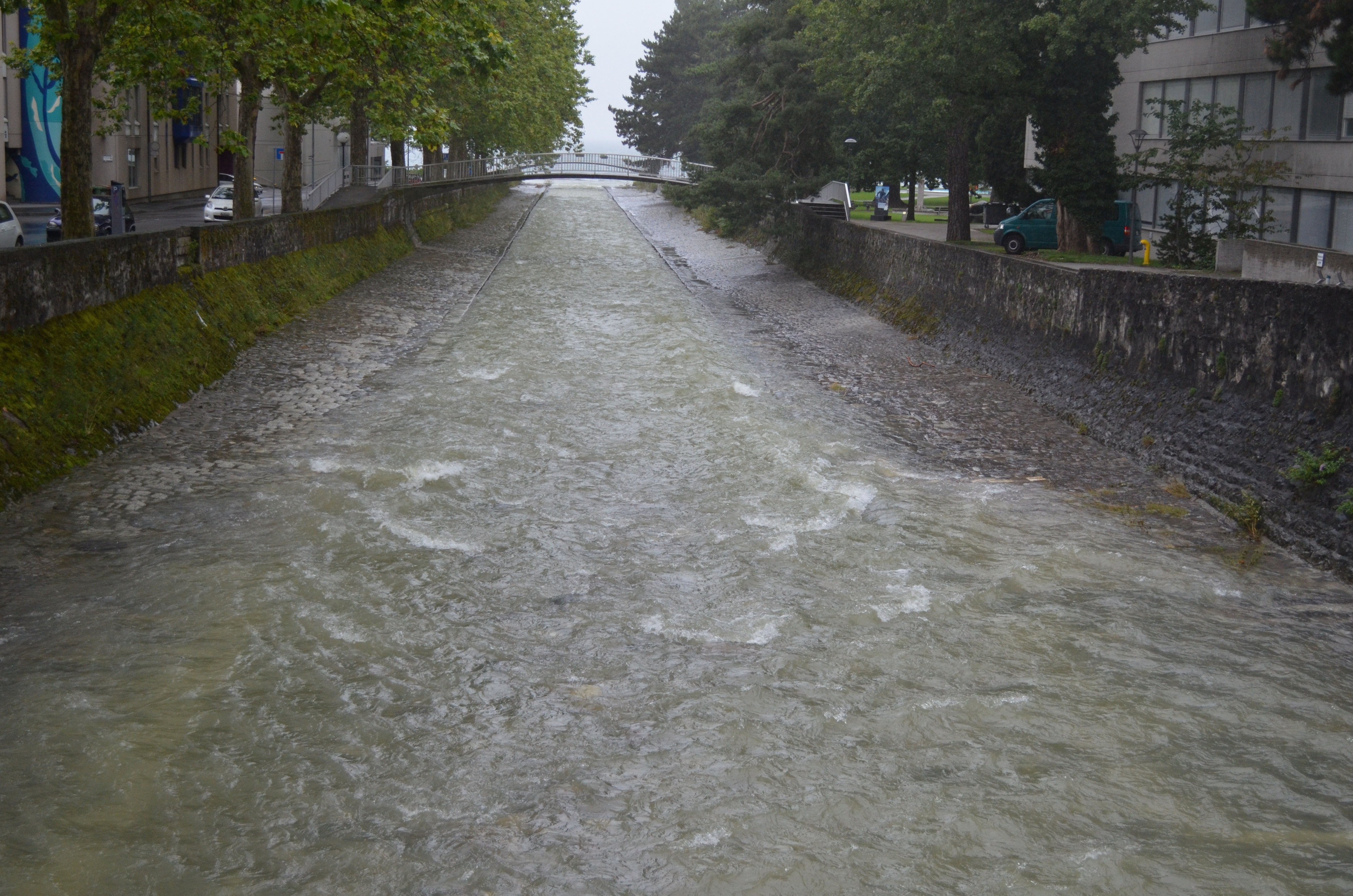 Veveyse (Vevey-Suisse) - embouchure après un orage d'été. Photo depuis le pont entre le quai de la Veveyse et le quai de l'Arabie.